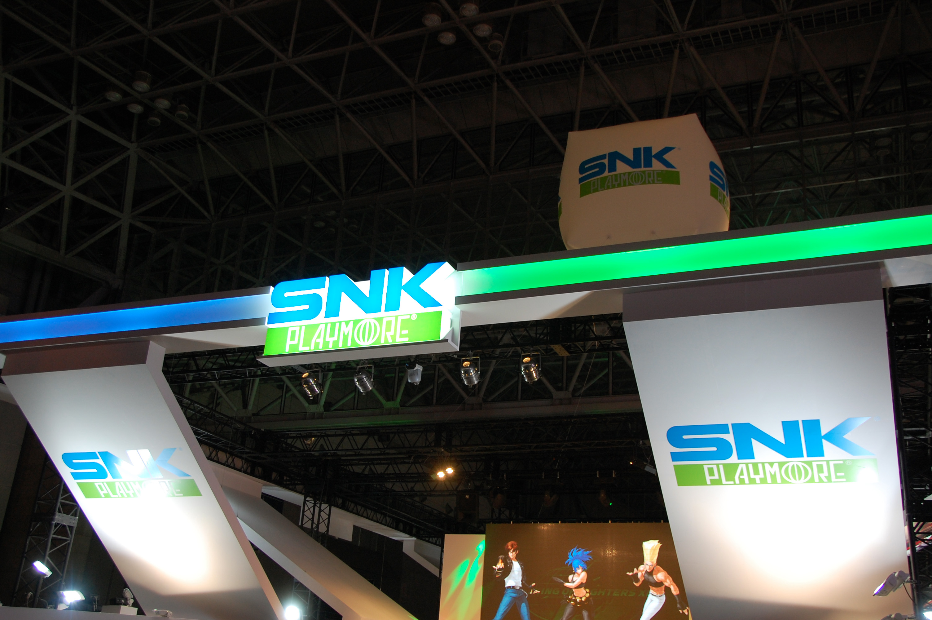 2008東京電玩展，SNK Playmore攤位。